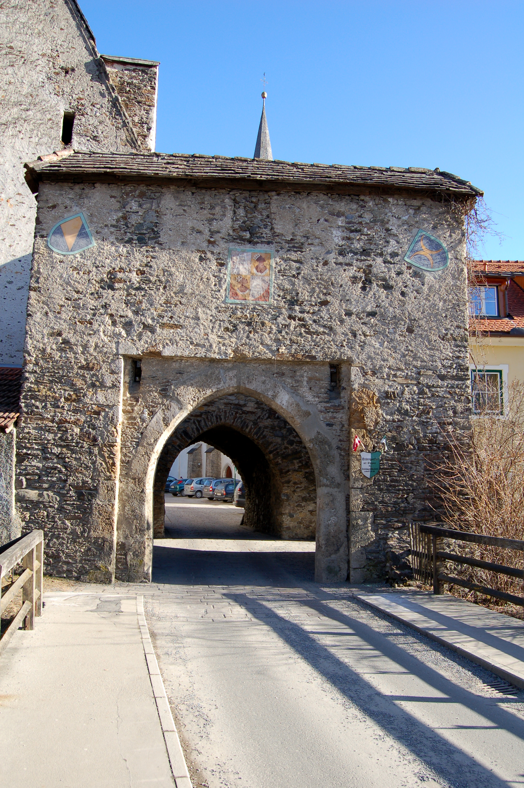 Hintereggertor (14. Jh.) mit Wappen des Freisinger Bischofs in Oberwölz, Steiermark. Westseite der Stadtmauer, Brücke über den Schöttlbach.